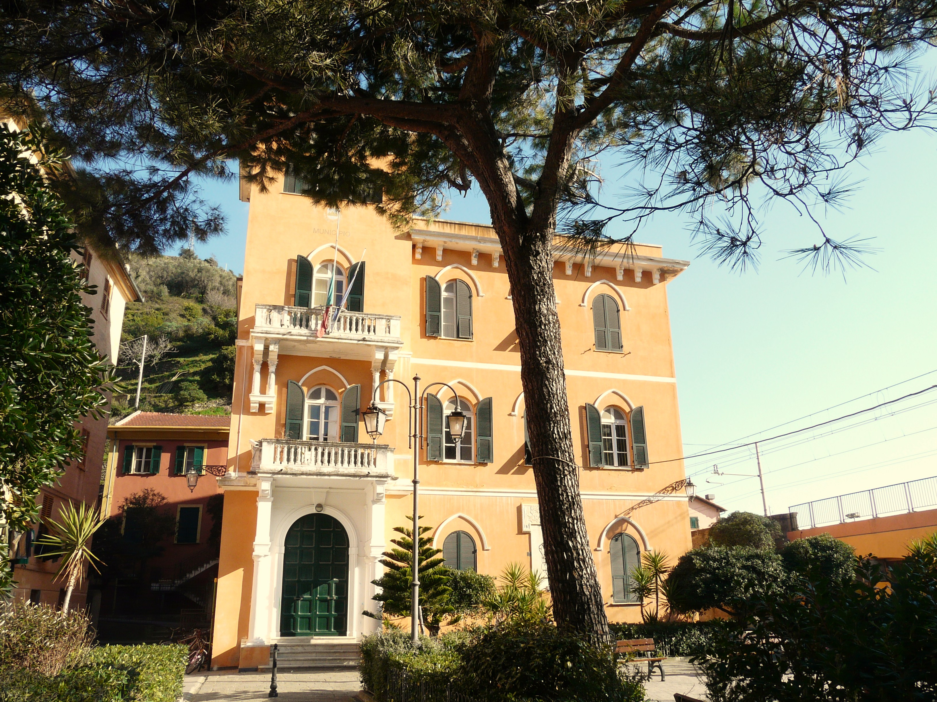 Municipio di Monterosso al Mare, Cinque Terre, La Spezia, Liguria, Italia